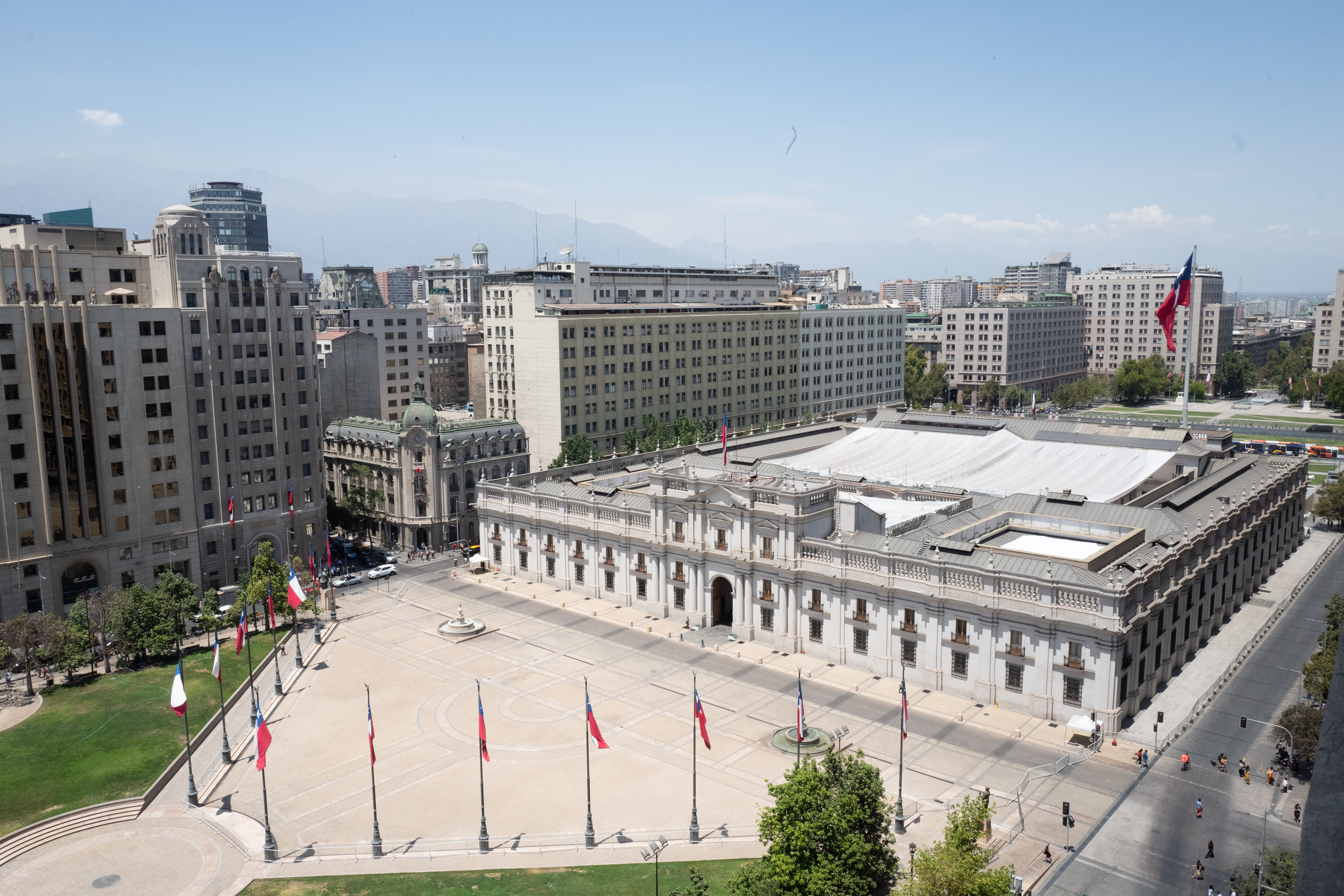 Visita in loco Chile - jan 2020